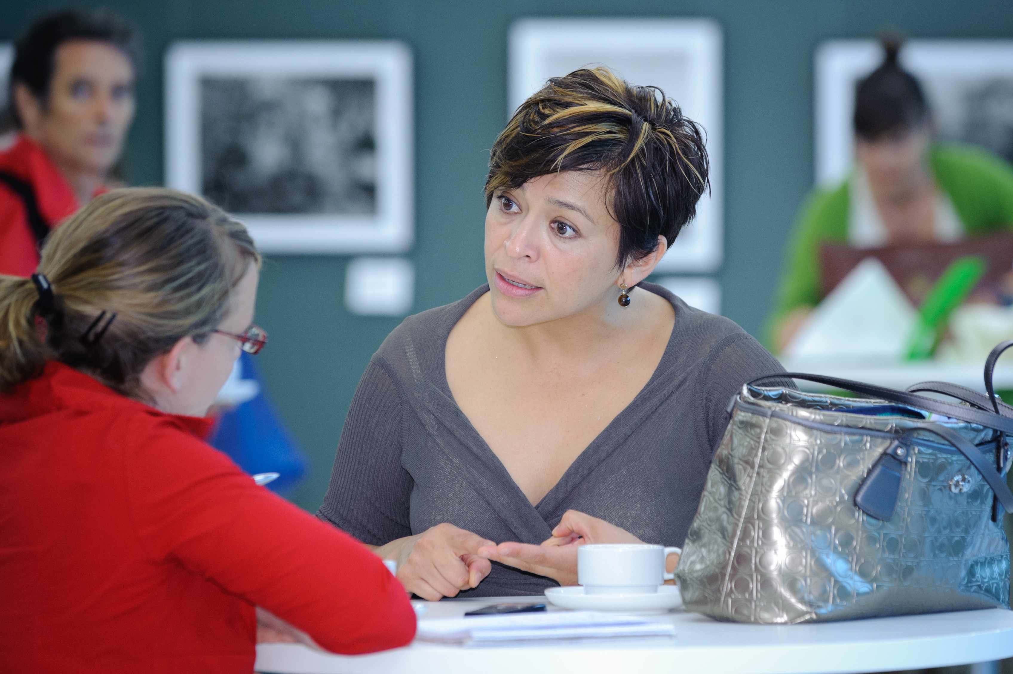 Anabel Herandez (Journalistin, Autorin, Mexiko Stadt, Mexiko) Foto: Stephan Röhl